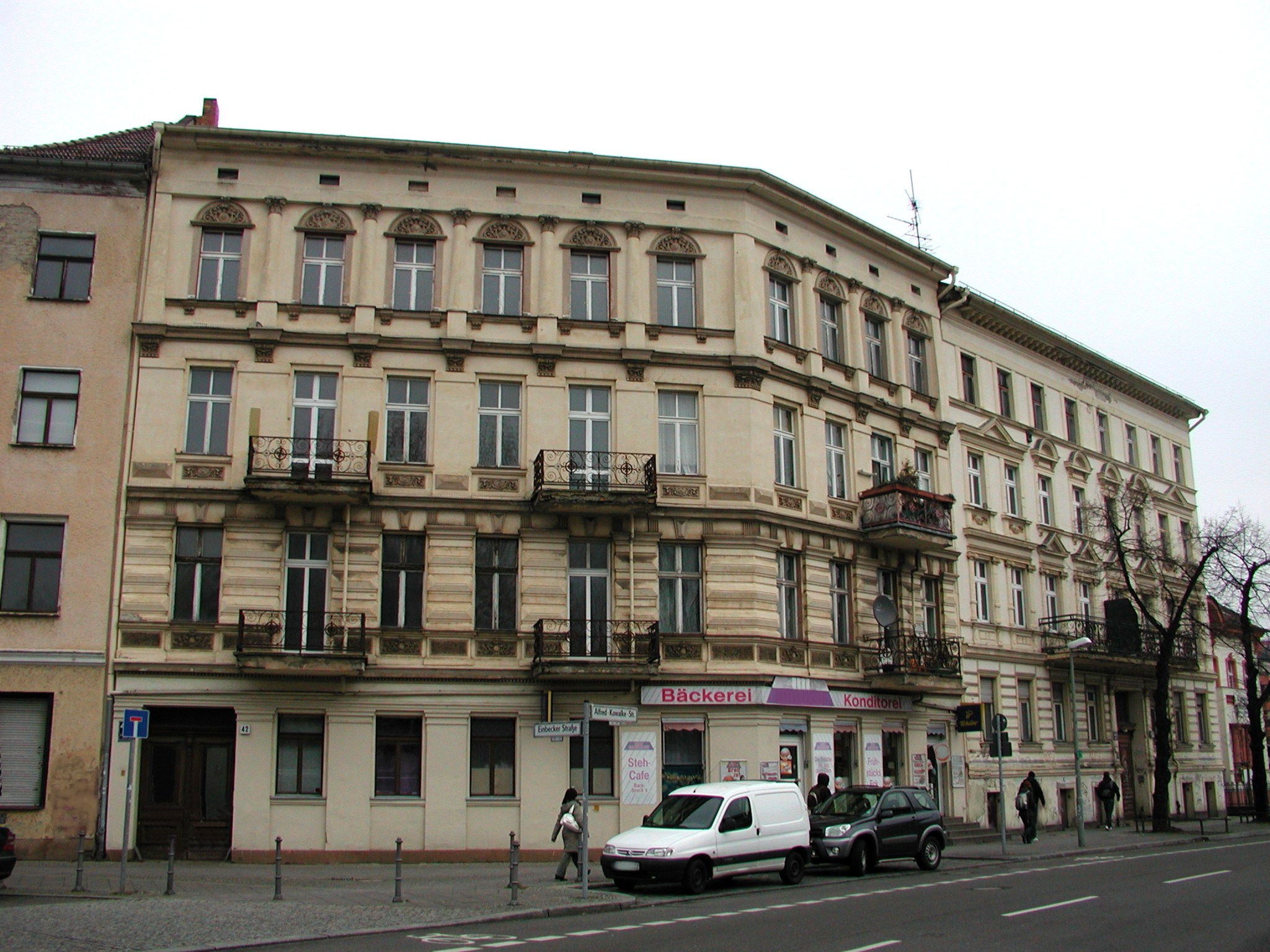 Alfred-Kowalke-Straße 42, Friedrichsfelder Kiez, Berlin